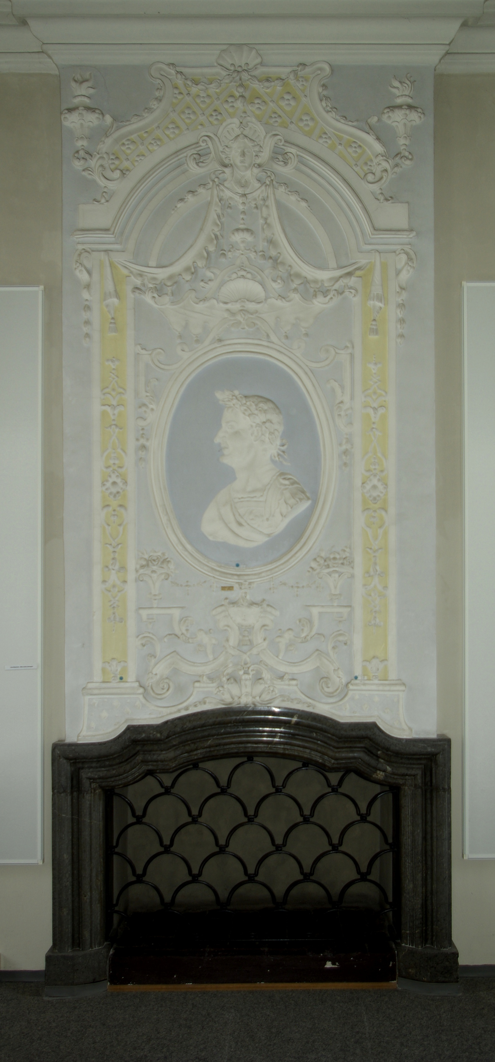 Stuckverzierungen im Festsaal des Egloffsteinschen Palais in Erlangen